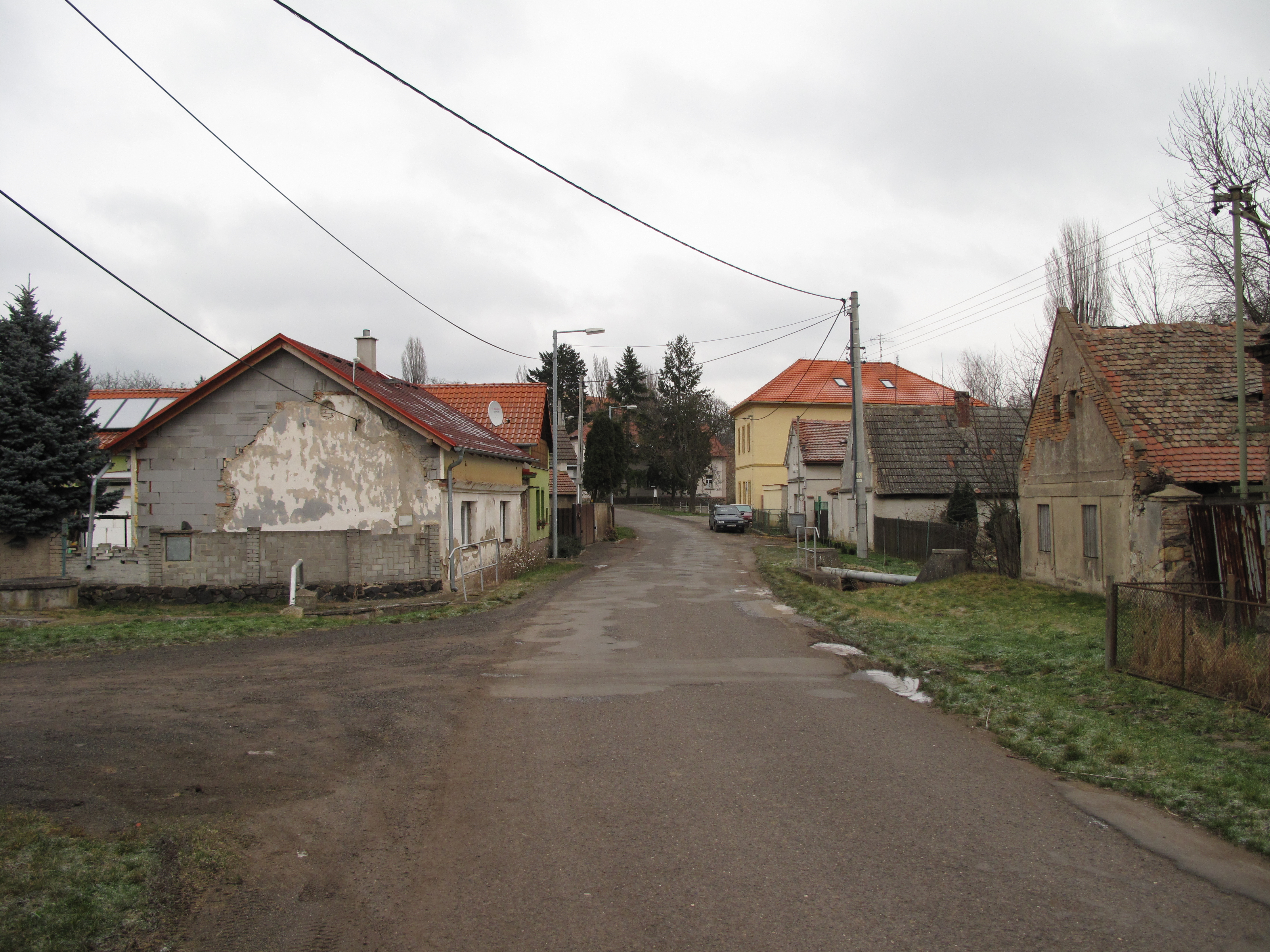 Silnice v Dlažkovicích. Okres Litoměřice, Česká republika.